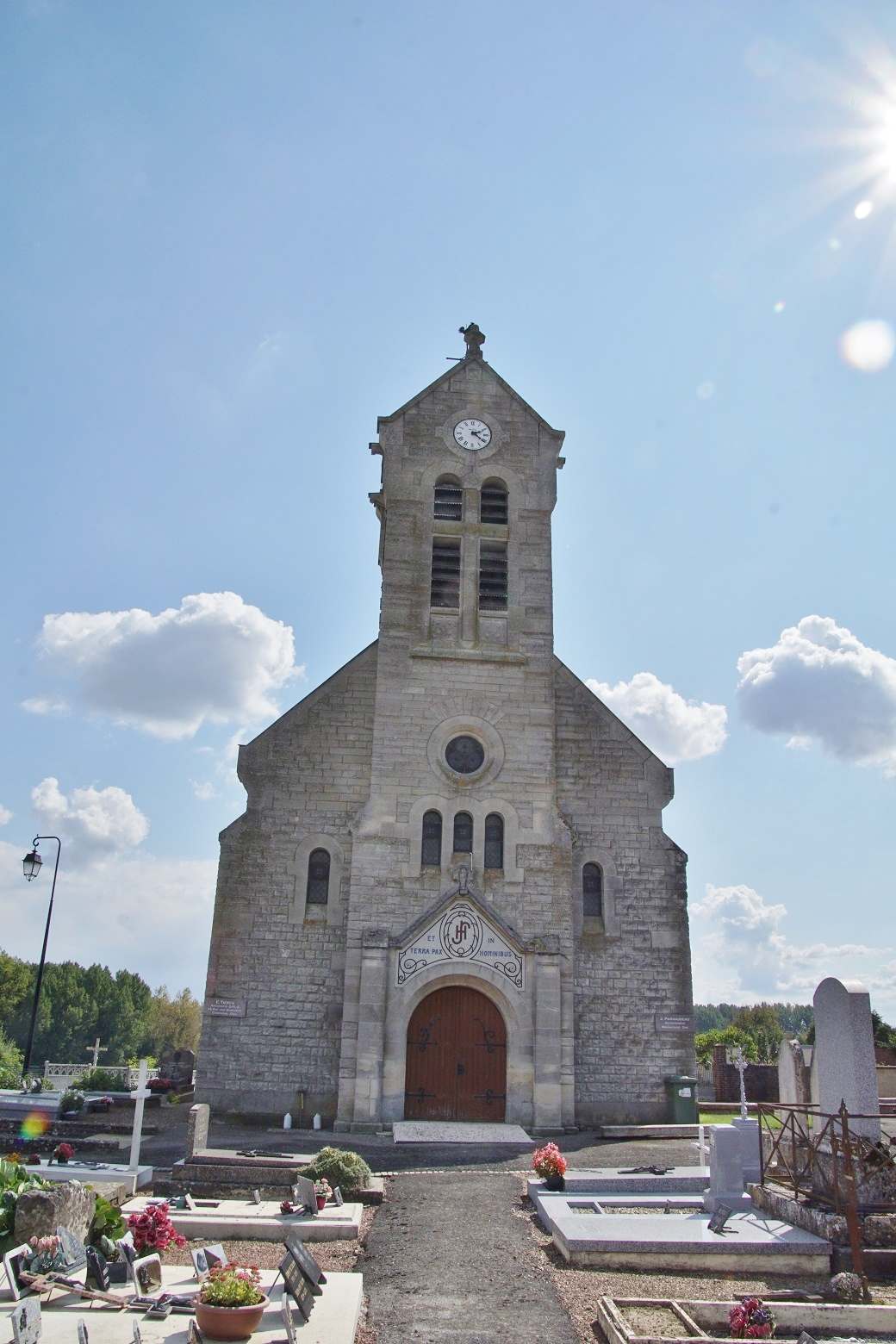 Église Saint-Médard de Muirancourt (60).